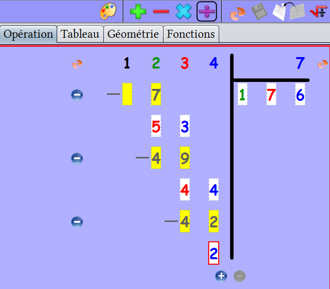 Présentation de l'onglet Opérations de MathEOS